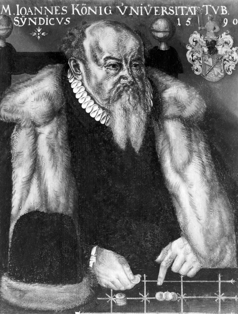 M. Johannes König (* um 1530 oder laut Surkamp 17. Juli 1521; † Tübingen 9.März 1590). Gemälde von 1590 fotografiert von Ernst Surkamp auf einer 18x24 cm großen Glasplatte.